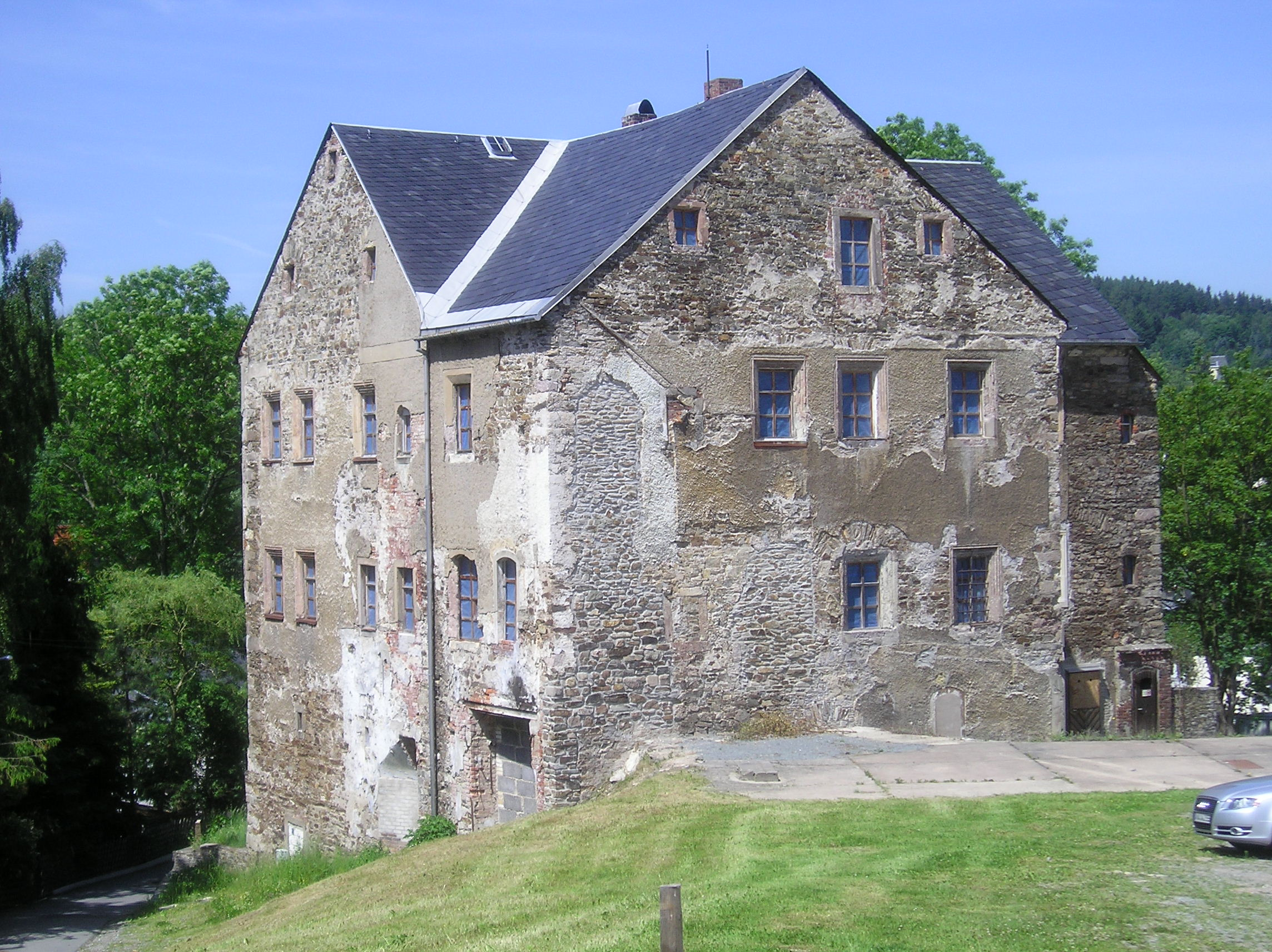 Lotterhof von Osten